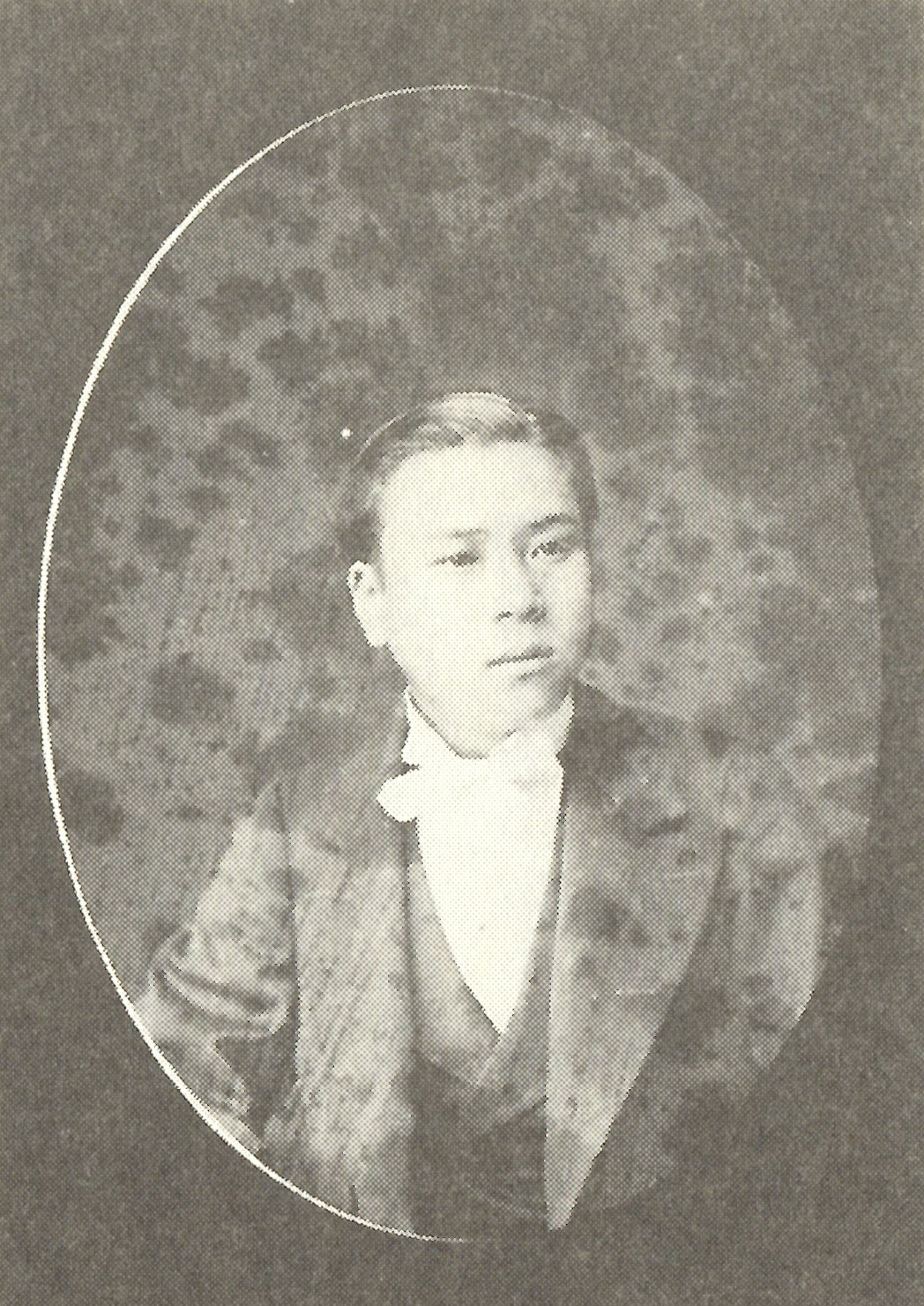 大宮以季の肖像写真。